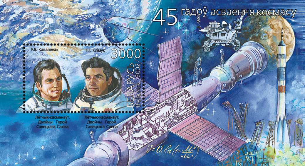 Беларуская (тарашкевіца): Уладзімер Кавалёнак, Пётар Клімук. Марка Белпошты